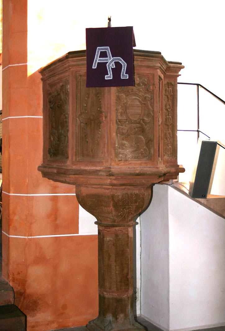 Die Marienkirche in Büdingen, Innenansicht - Hochaltar